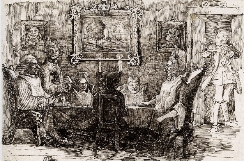 drawing for Geist der Kochkunst